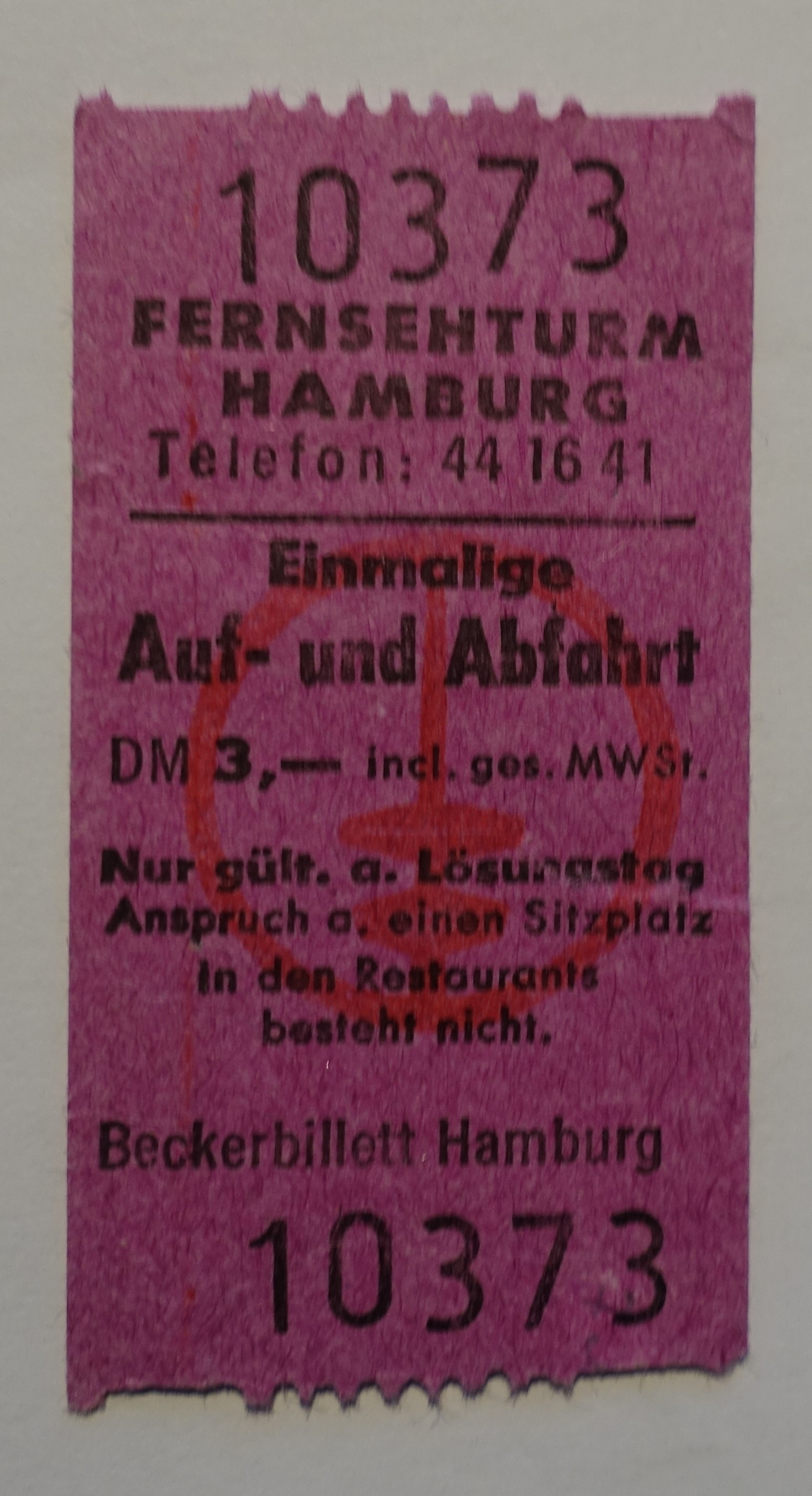 Ticket für die einmalige Auf-und Abfahrt auf den Hamburger Fernsehturm